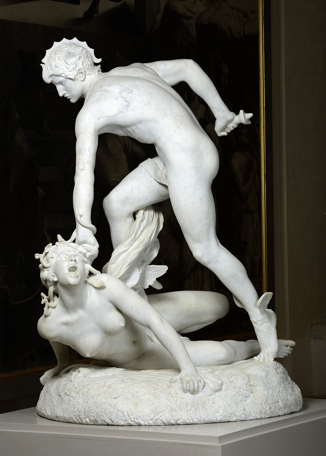 Statuette